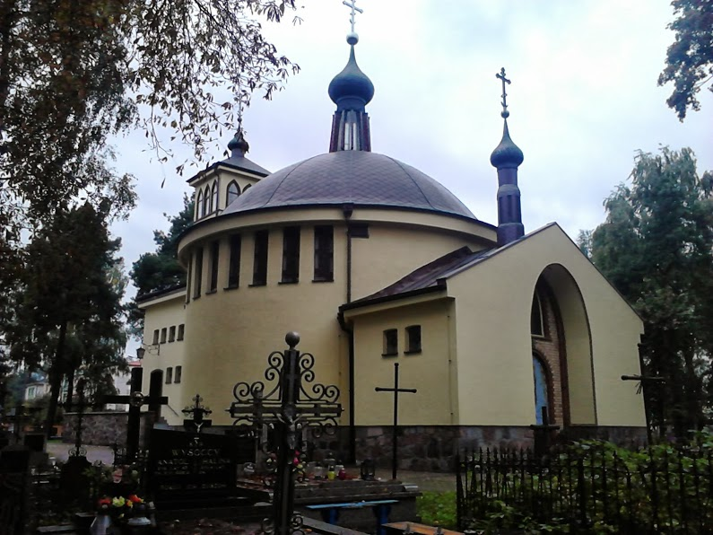 Cerkiew Zaśnięcia Matki Bożej w Białymstoku-Starosielcach